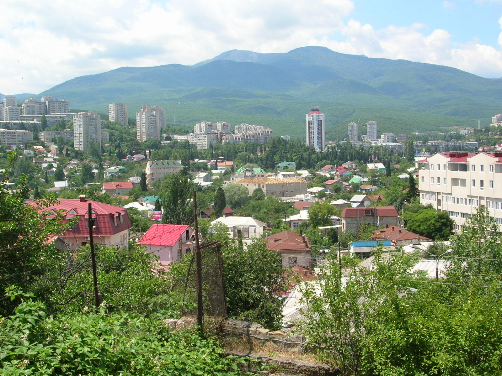 alushta